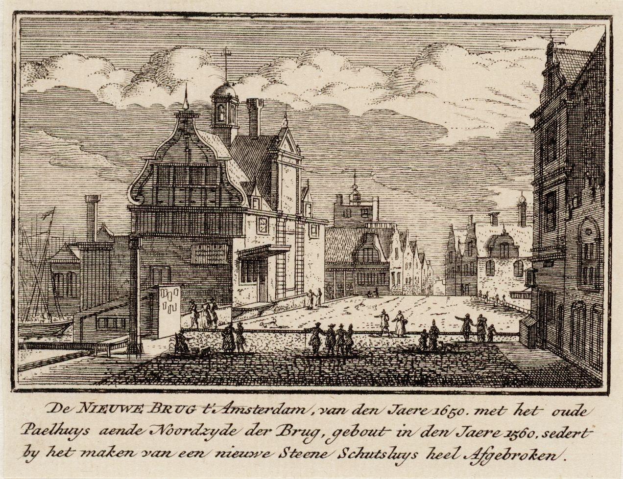 De Nieuwe Brug t'Amsterdam, van den Jaere 1650. met Paalhuis. Prent. Amsterdam, Stadsarchief Amsterdam, collectie Atlas Splitgerber.